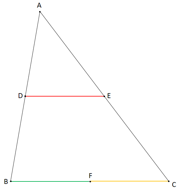 r64645